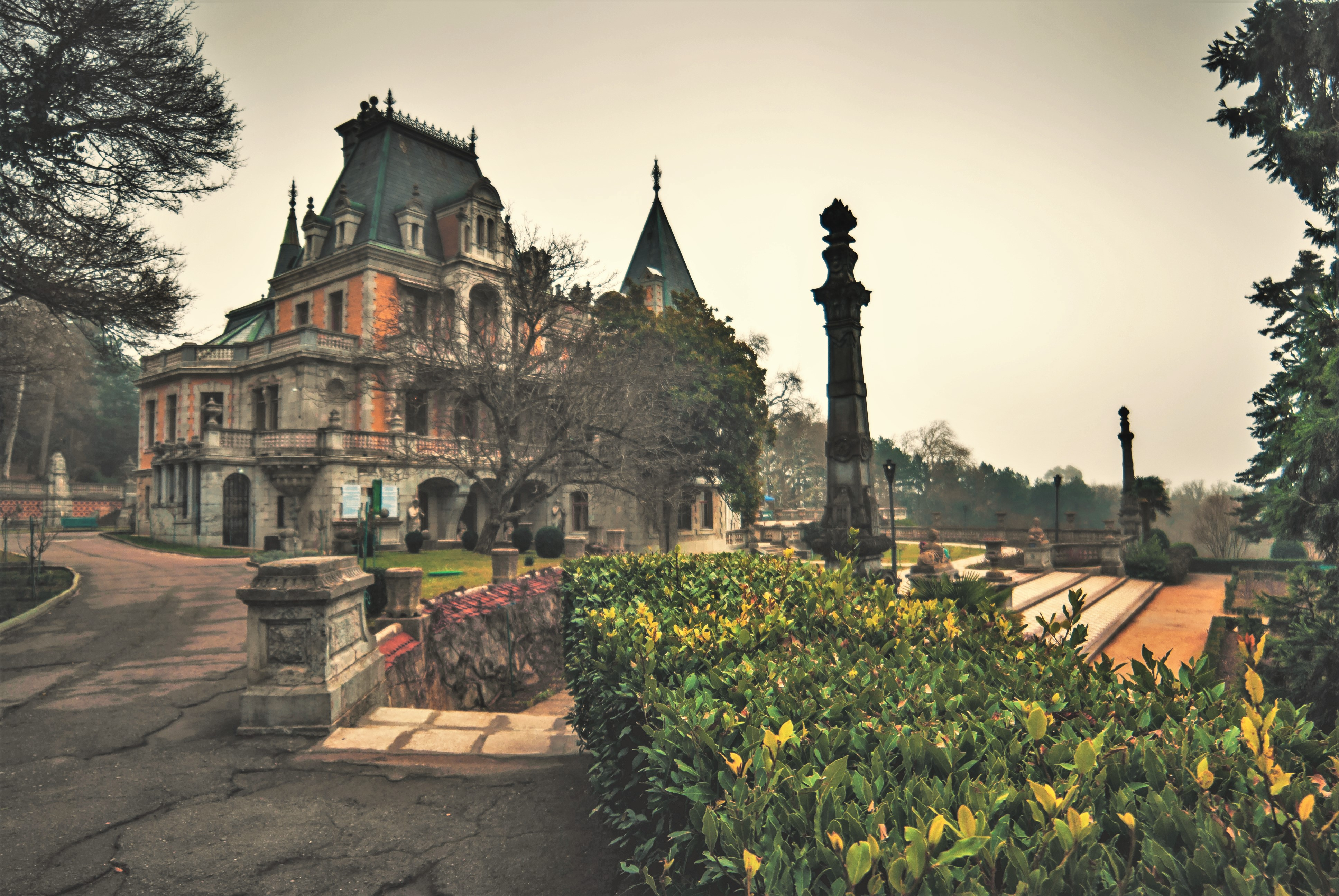 Комплекс споруд палацу Олександра III, Масандра, вул. Сімферопольське шосе, 13, 1) літер « А»